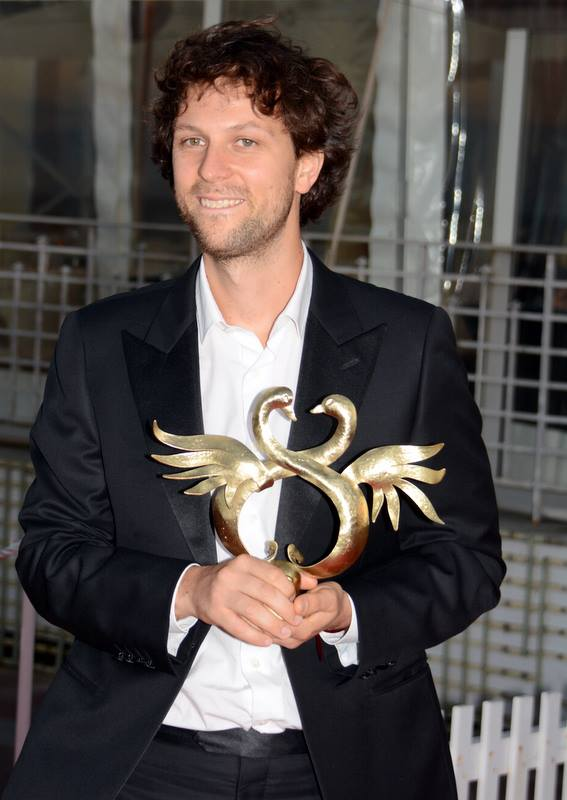 Pierre Rochefort au festival du film de Cabourg